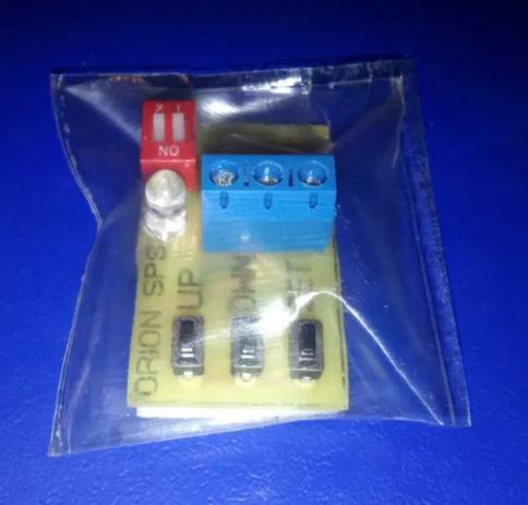 Автомобільний контролер - сторобоскоп додаткового стоп сигналу